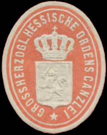 Sealing stamp Title: Grosh. Hessische Ordenskanzlei Description: rot, weiß, geprägt Place: Darmstadt size: 3x2 cm